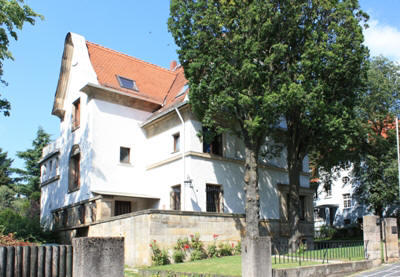 Foto des Verbindungshauses der Alten Darmstädter Burschenschaft Germania